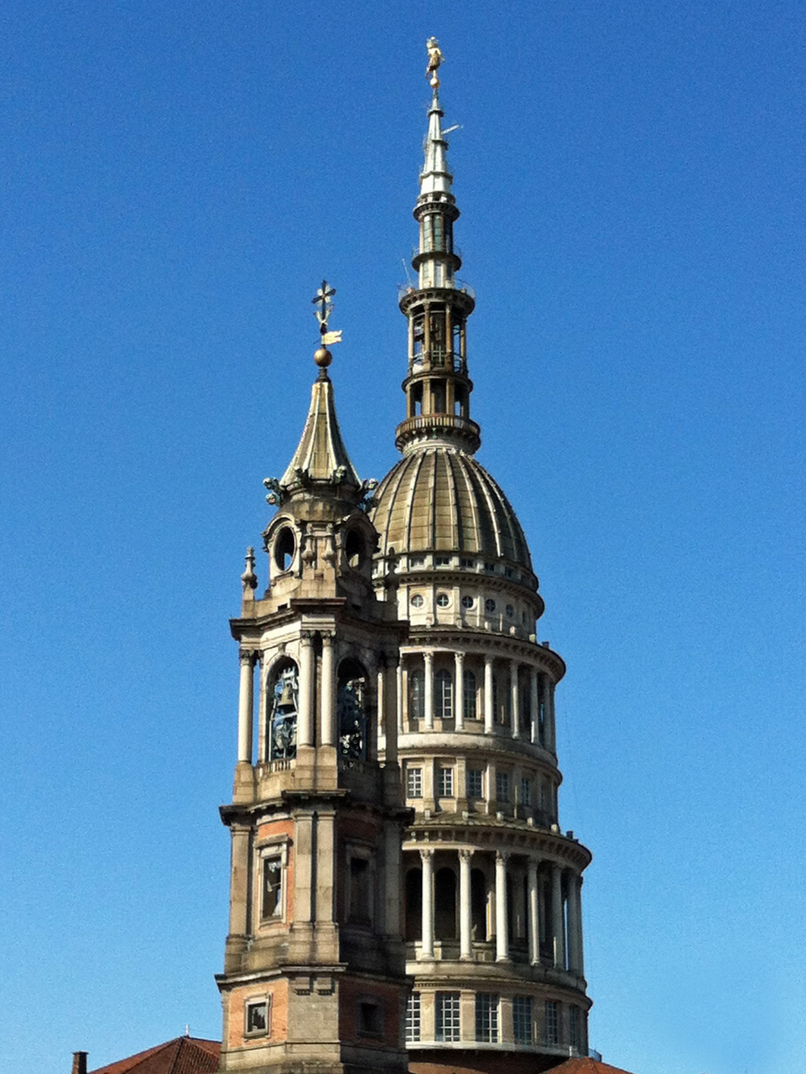 Cupola San Gaudenzio